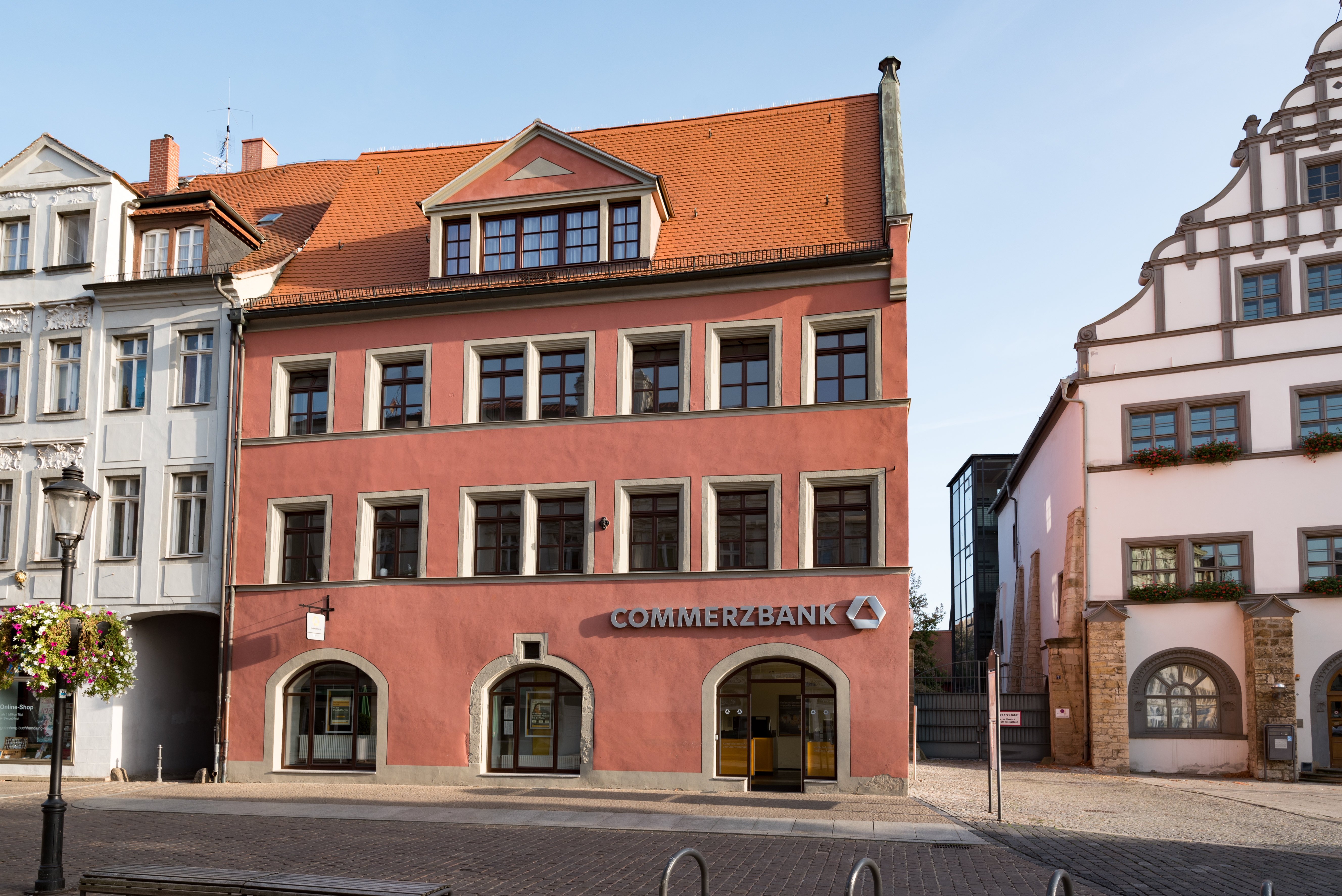 Naumburg (Saale), Jakobstraße 1